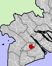 Phung Hiep District, Hau Giang Province, Vietnam.